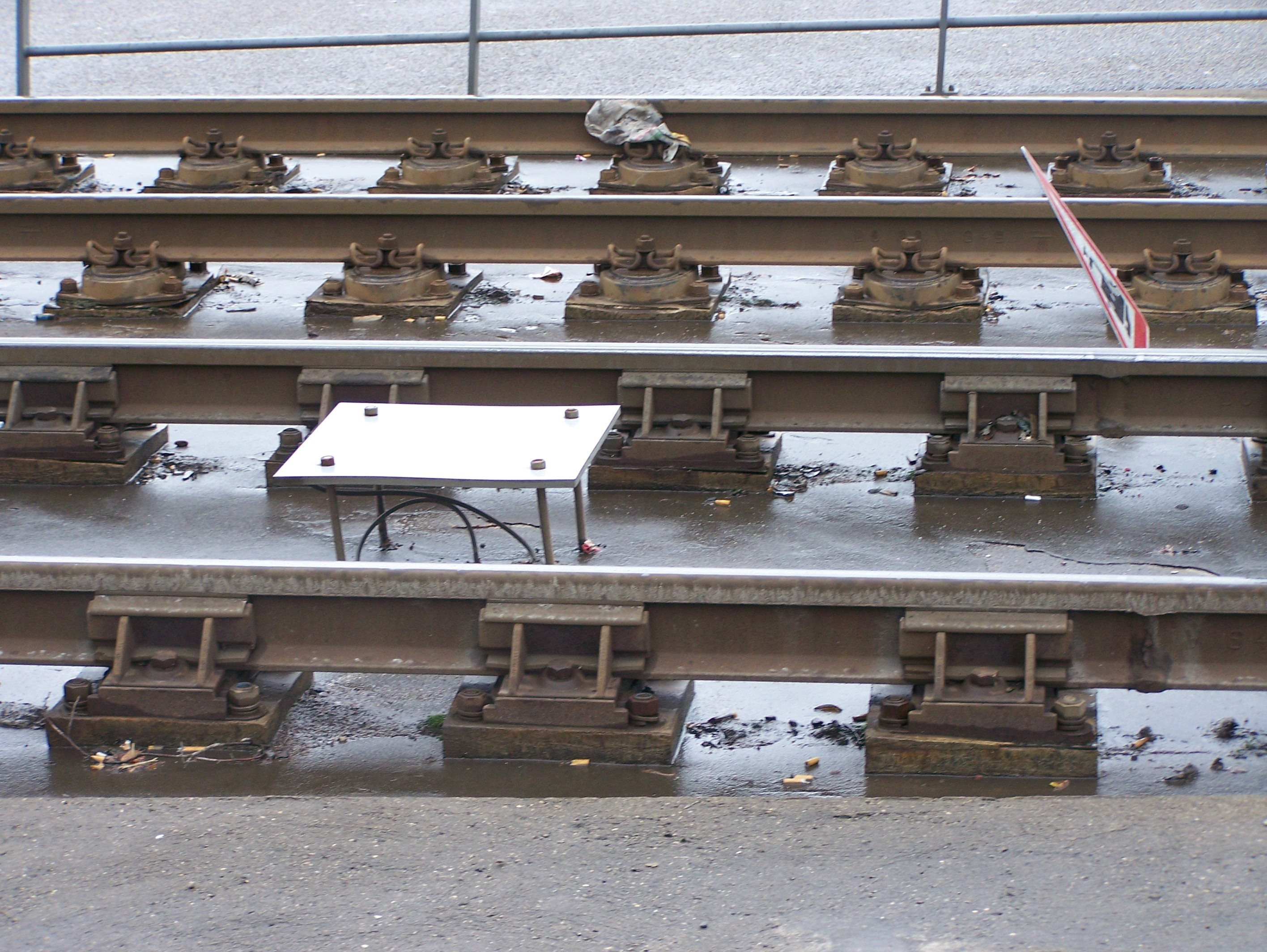 Besonderer Abschnitt mit offener Ausführung der festen Fahrbahn auf dem Streckennetz der Saarbrücker Stadtbahn auf der Saarbrücker Josefsbrücke zwischen den Haltestellen Ludwigstraße und Cottbuser Platz